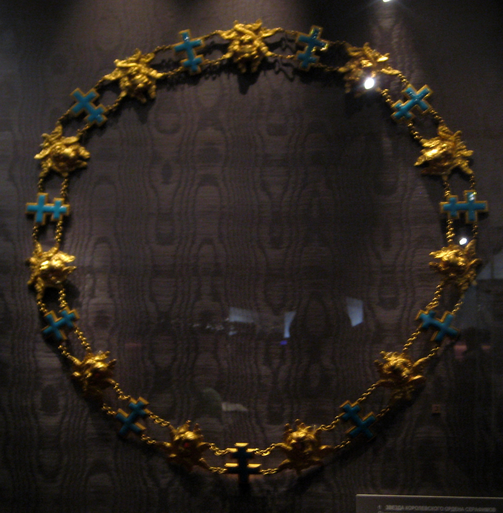 Цепь королевского ордена Серафимов. Принадлежала Николаю II. 1908